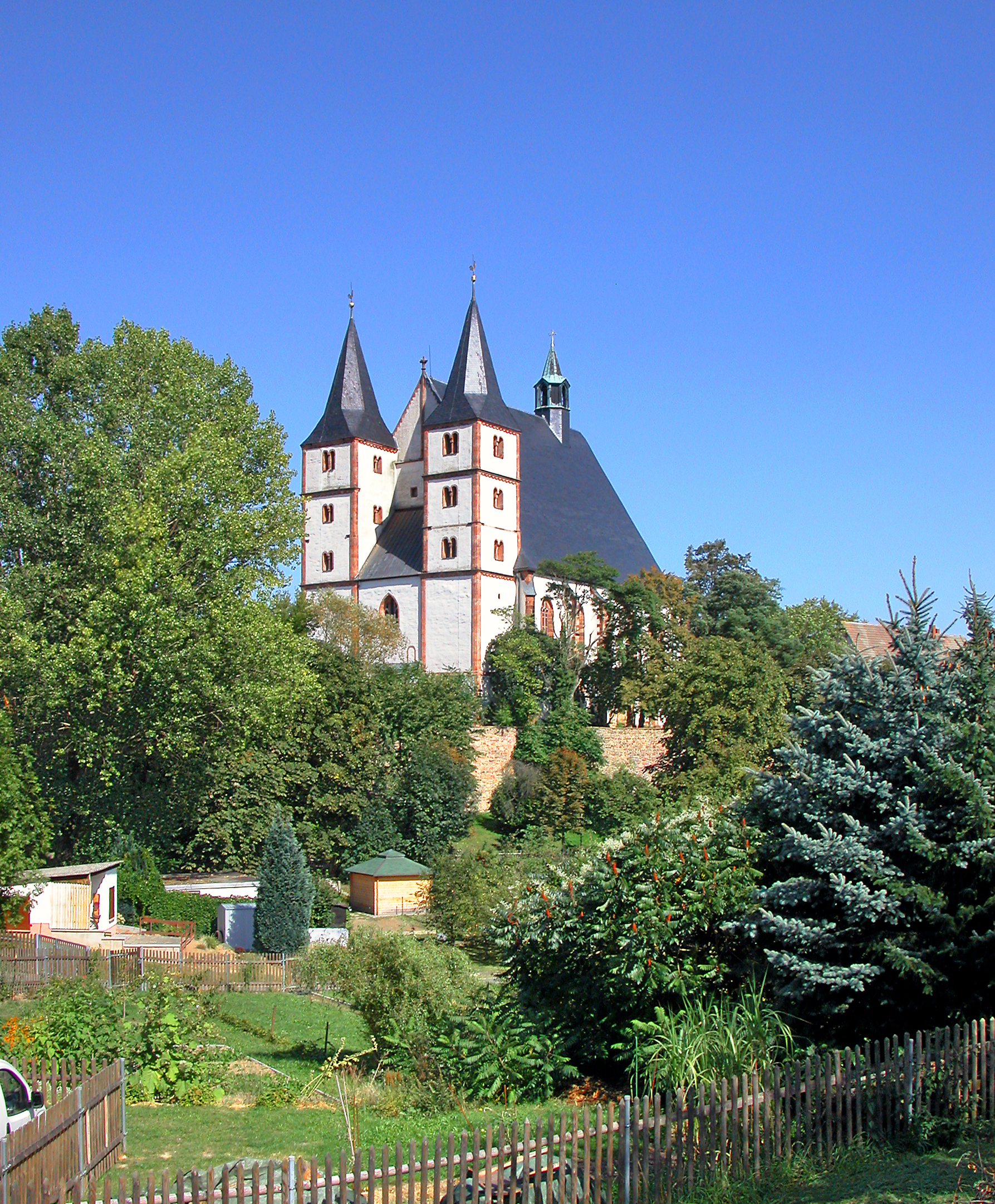 01.09.2009 04643 Geithain: St. Nikolaikirche (GMP: 51.054307,12.689032). Am Anfang des 12. Jahrhunderts wurde die Kirche mit ihren 42 m hohen Westtürmen im spätromanischen Stil erbaut. Das 3-schiffiges spätgotisches Hallen-Langhaus wurde 1504 begonnen. [DSCN38754.TIF]20090901330DR.JPG(c)Blobelt